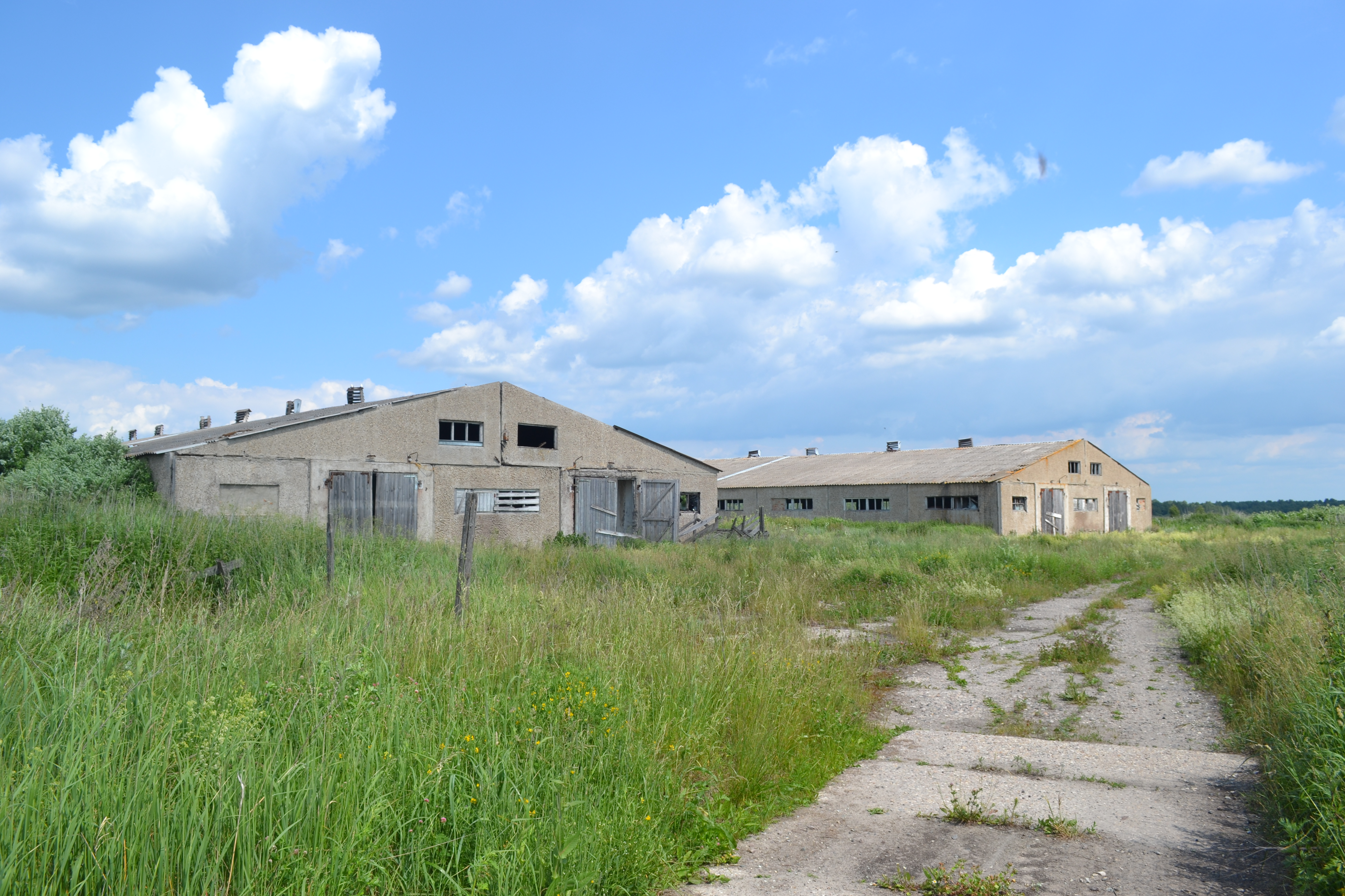 Заброшенная ферма в деревне Шеино (Шатурский район)